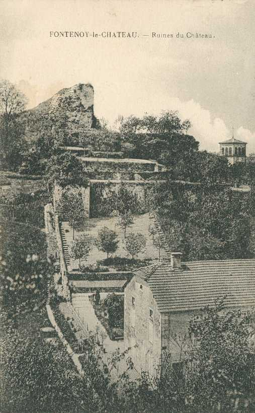 Château de Fontenoy vers 1900.carte postale